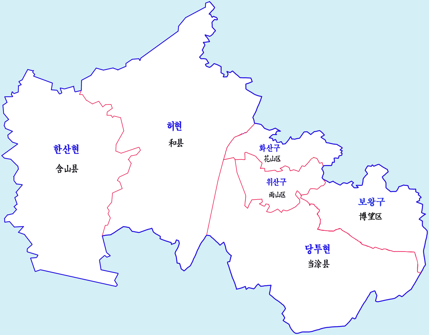 마안산시 현급구역도